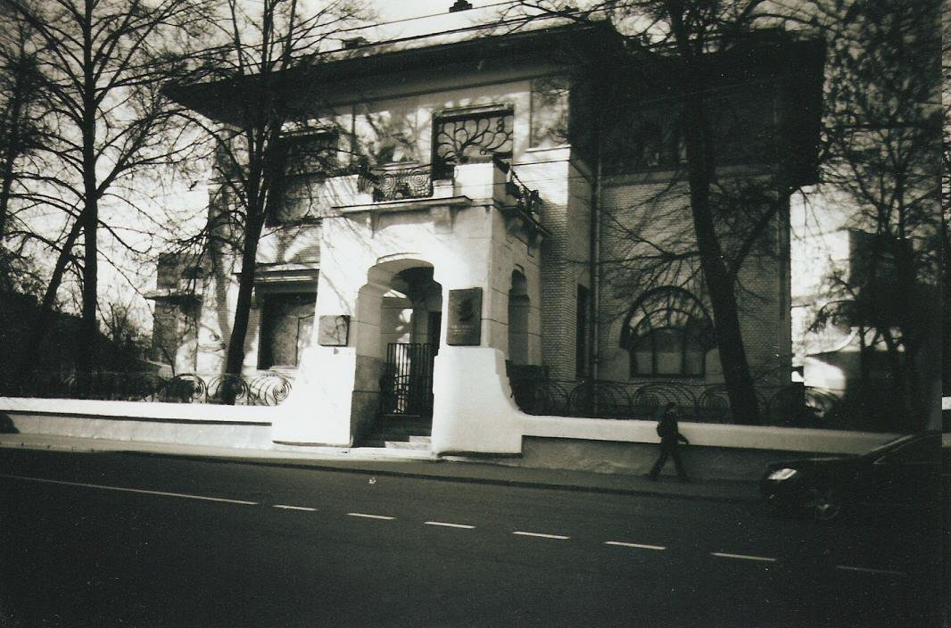 Москва, Малая Никитская улица, дом 6/2, строение 5. Дом Рябушинского.